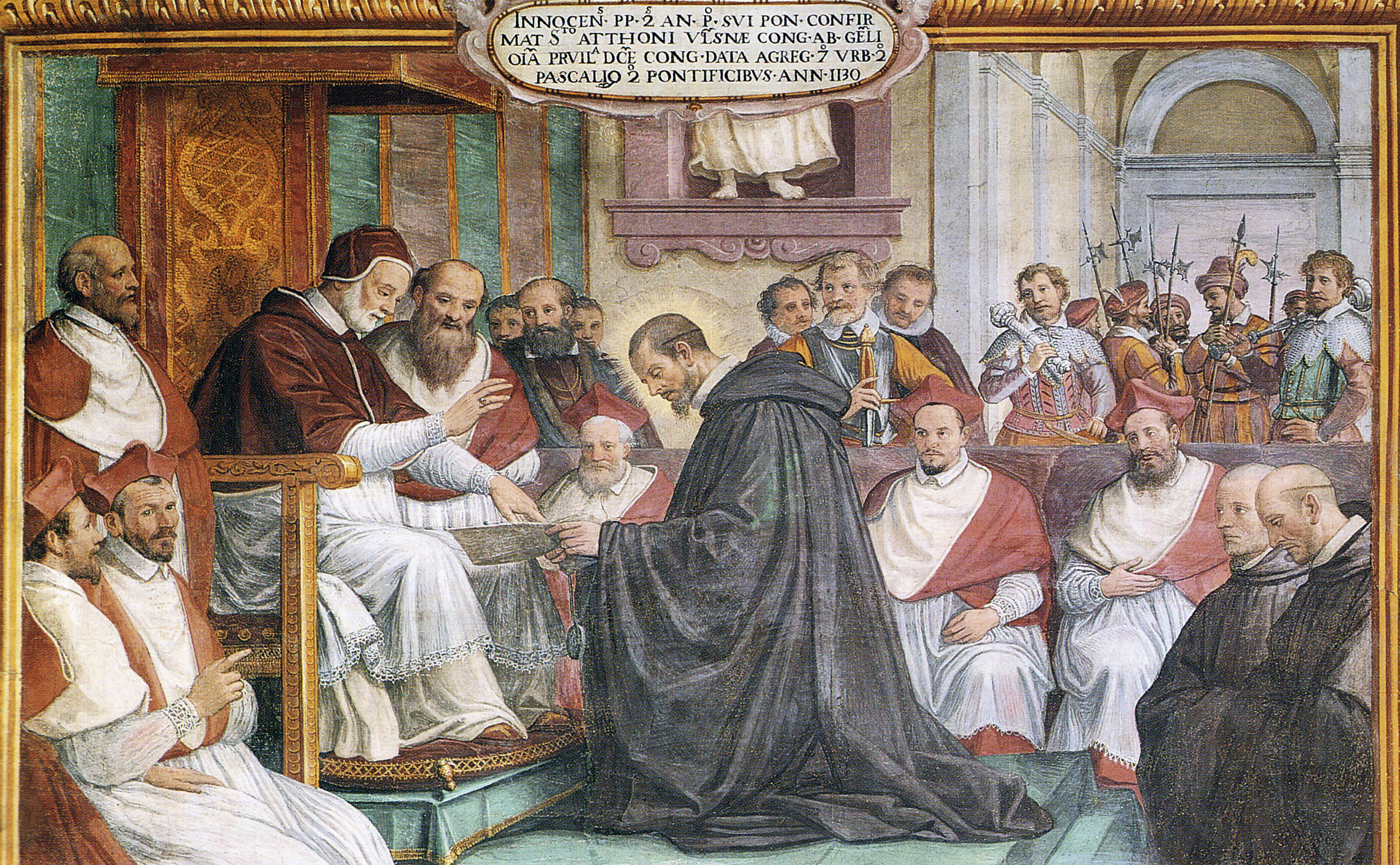 Benedetto Veli (1609) - Papa Innocenzo II incontra l'abate Atto di Passignano (Abbazia di Passignano)